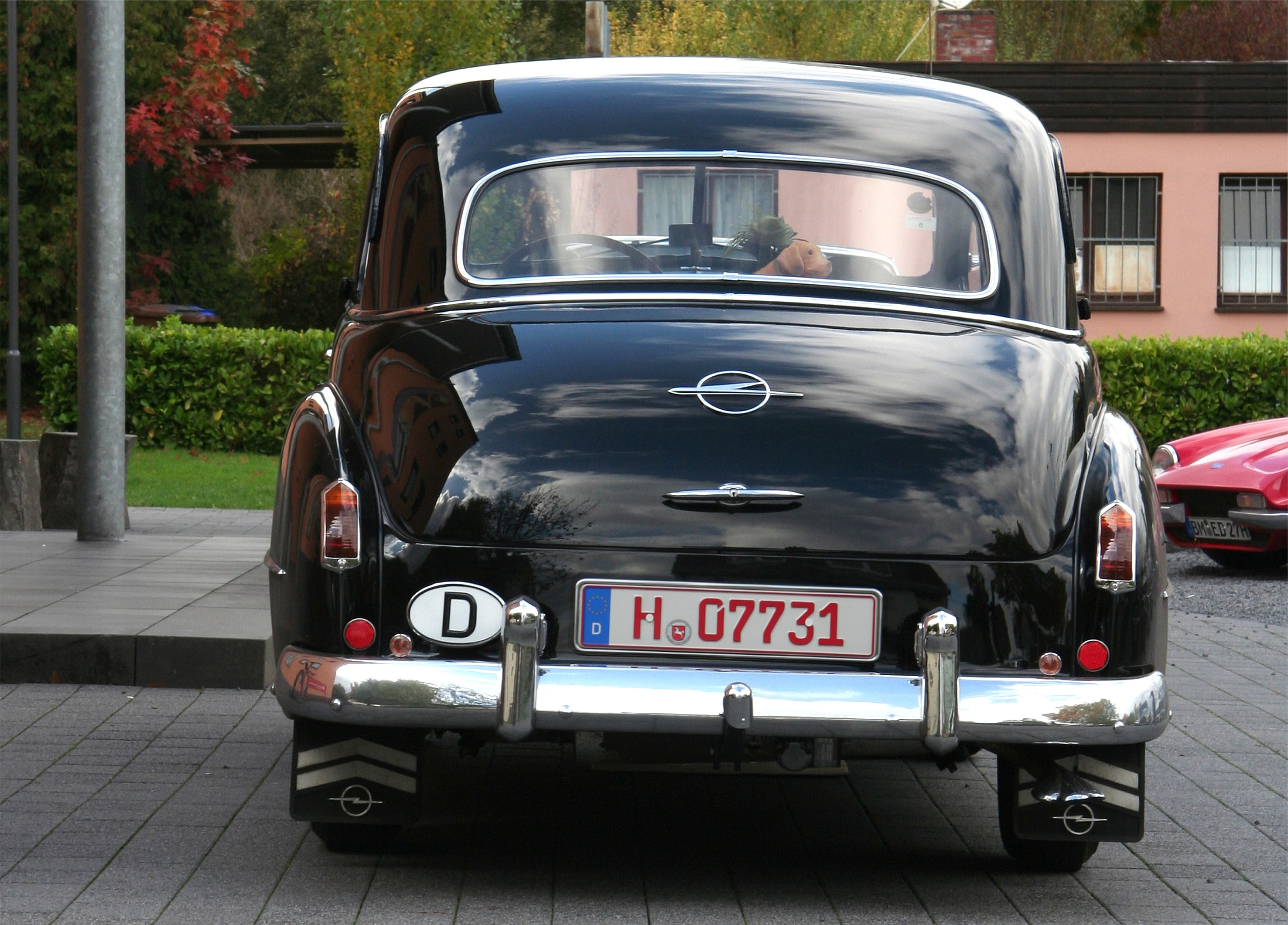 Opel Kapitän ’51 mit der damals modischen Sonnenblende über der Windschutzscheibe und Schirmen über den Scheinwerfern